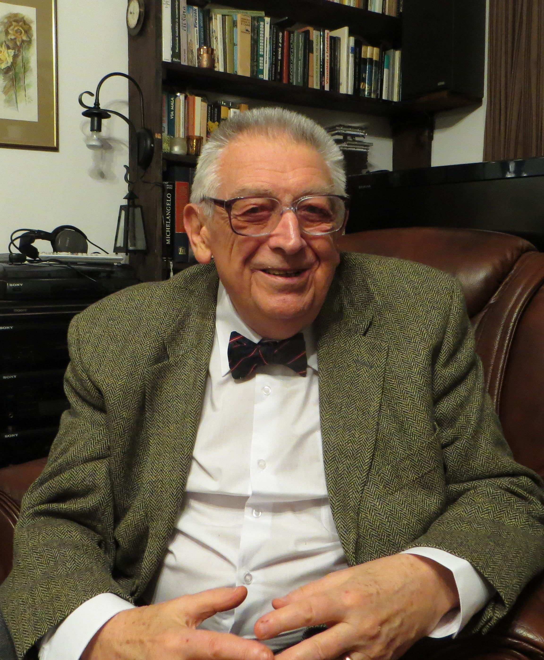 Hőnyi Ede 2017.